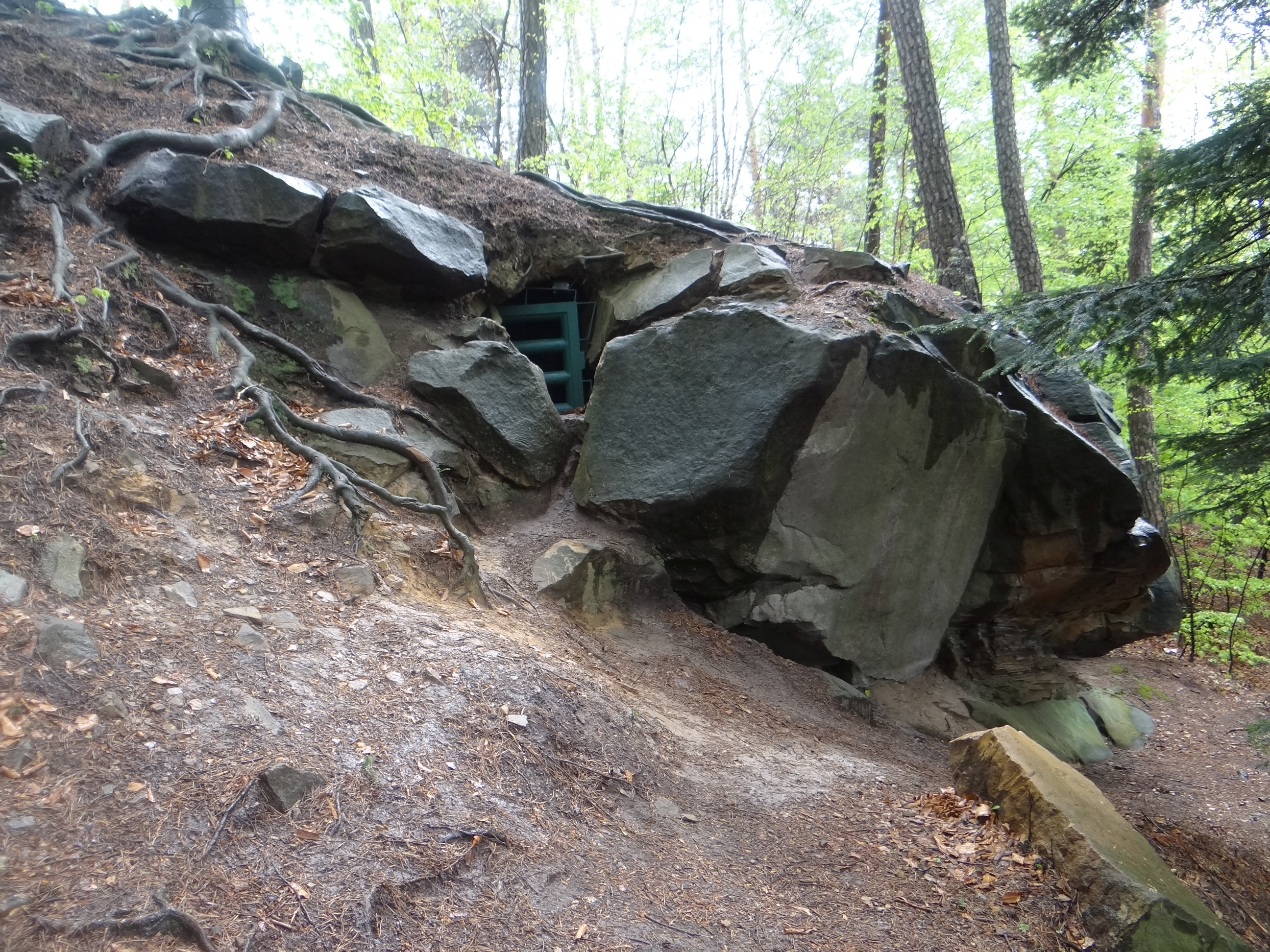 Diabla Dziura w Bukowcu